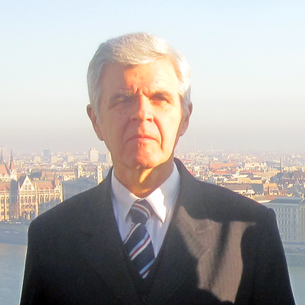 Rostoványi Zsolt egyetemi tanár